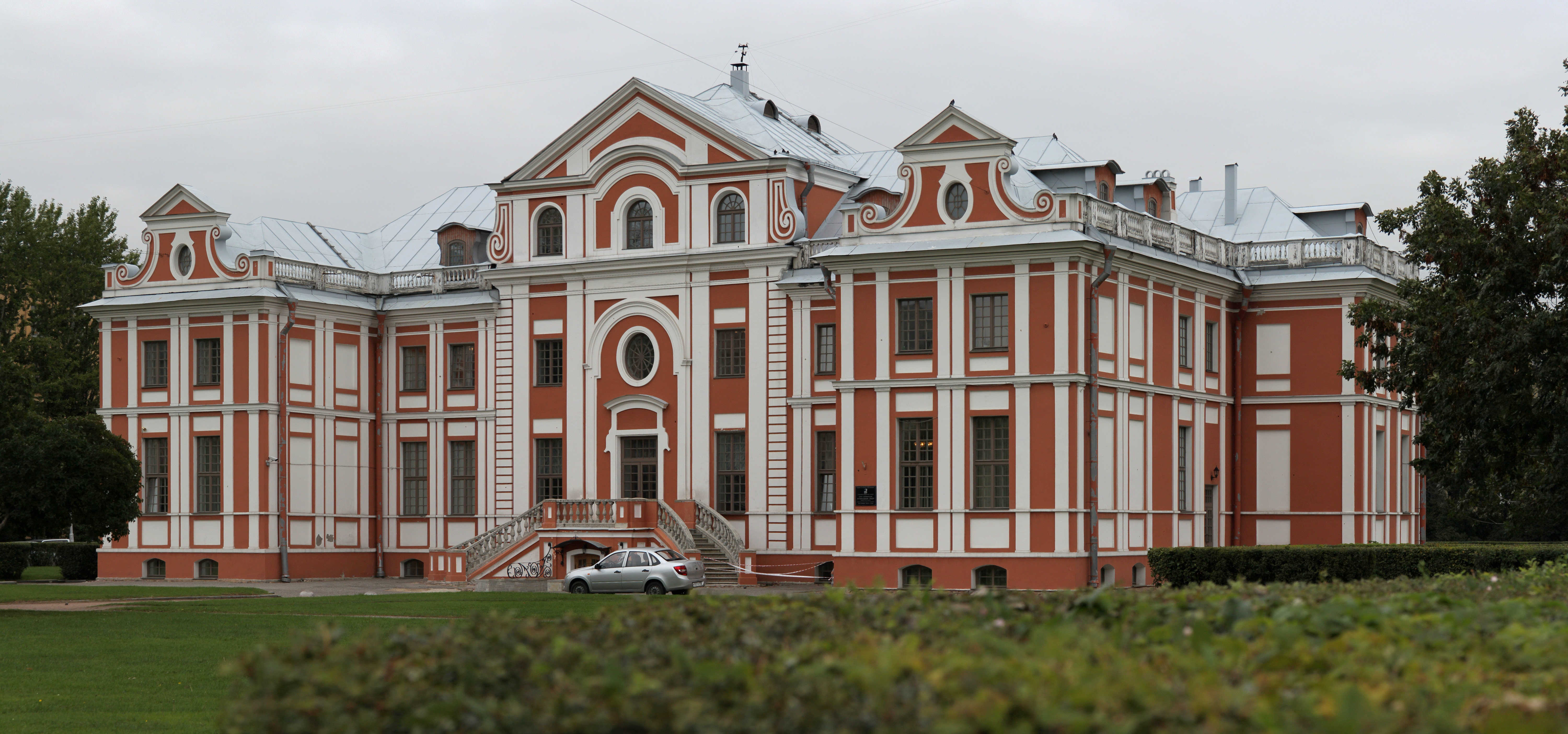 Палаты Кикина